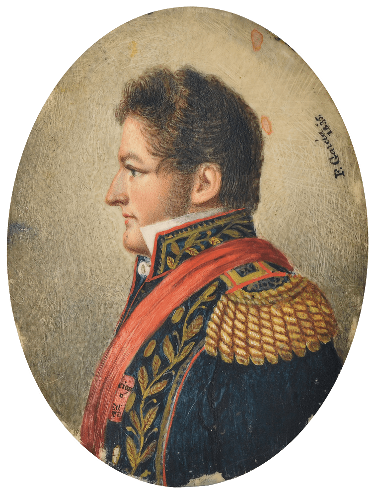 Juan Manuel de Rosas at age 42, 1835